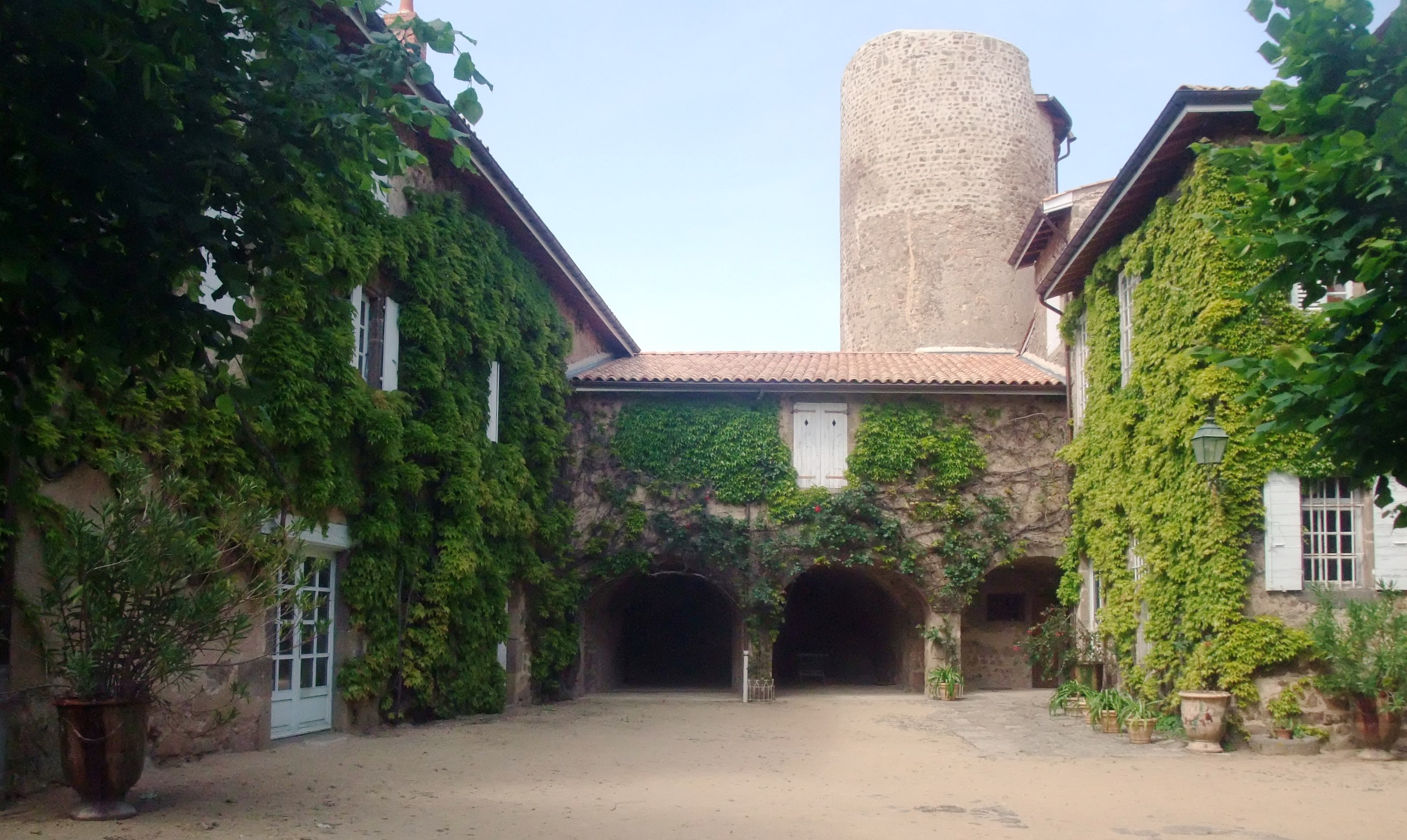 Brogieux cour ancienne